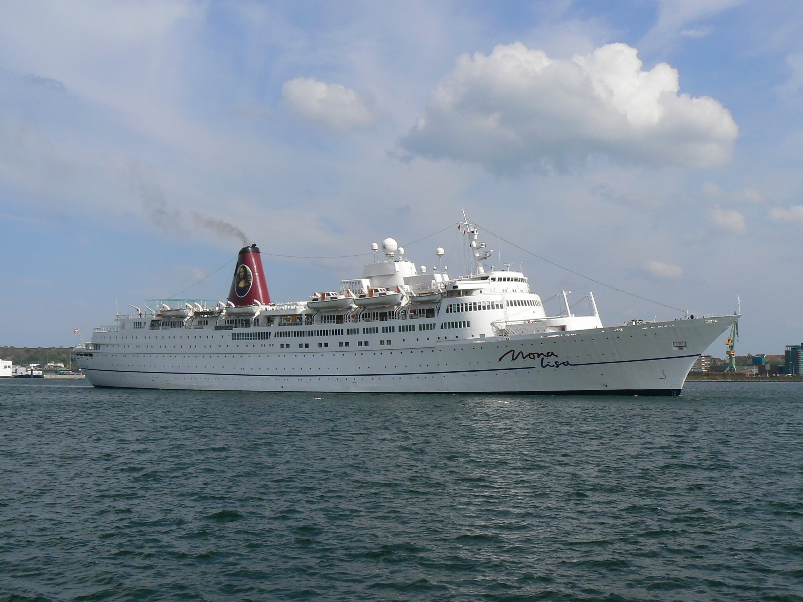 Kreuzfahrtschiff Mona Lisa im Kieler Hafen im April 2008. Information about Mona Lisa may be found at IMO 6512354.A ship can change name and flag state through time, but the IMO number remains the same through the hull's entire lifetime. As a result, it can be useful to identify a ship by using the IMO number.